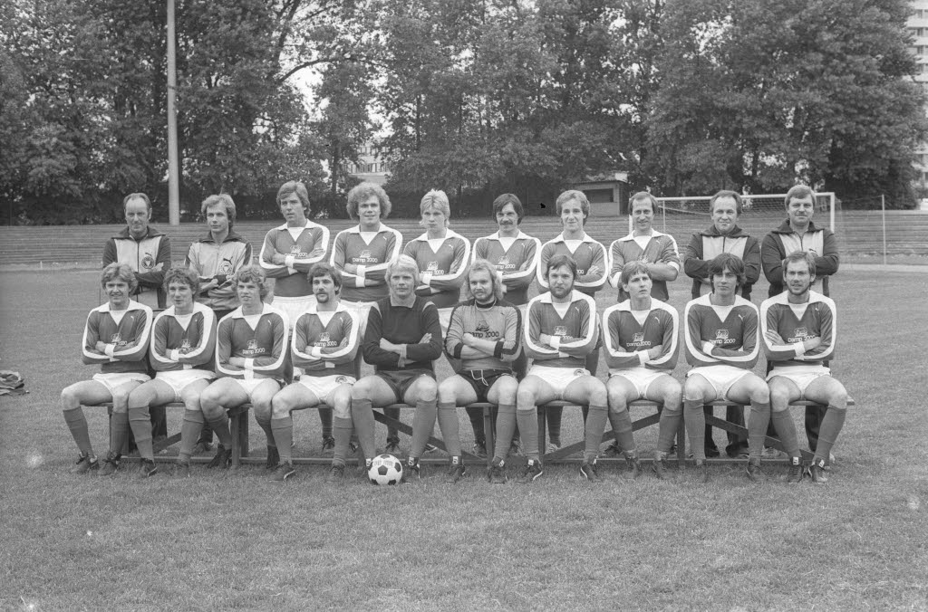 Hintere Reihe v.l.n.r.: Trainer Kuno Böge, Assistenztrainer Herbert Dohrn, Thorsten Landsberg, Burkhard Lüben, Holger Haltenhof, Dieter Wendland, Jürgen Kuzniacki, Jochen Aido, Ligaobmann Dietrich Lüben, Masseur Klaus Gudat. Vordere Reihe v.l.n.r.: Harry Witt, Thorsten Neumann, Axel Möller, René Back, Martin Burmeister (Torwart), Manfred Ludwig (Torwart), Gerd Andresen, Klaus Pötzke, Dietmar Tönsfeldt, Volker Tönsfeldt.